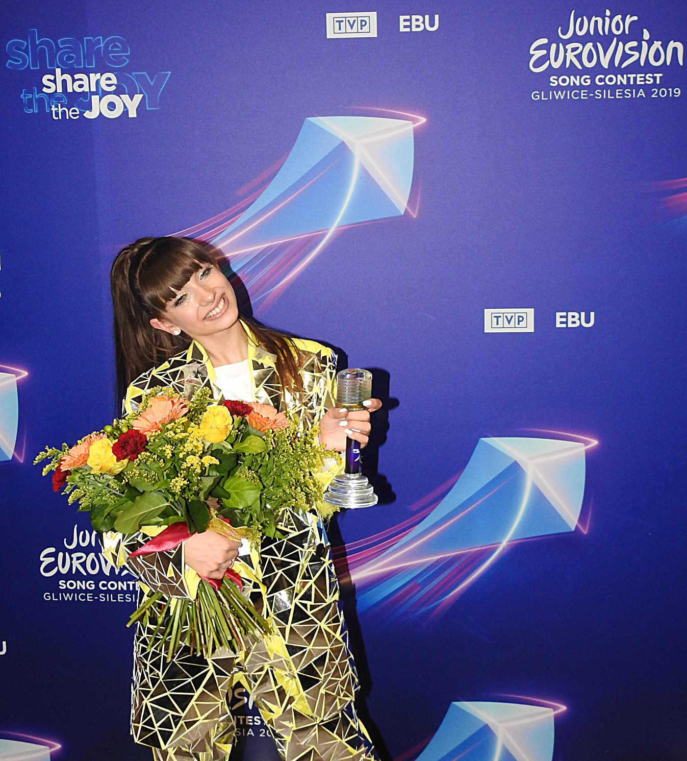 Polska piosenkarka Viki Gabor po wygraniu w finale 17. Konkursu Piosenki Eurowizji dla Dzieci 2019.